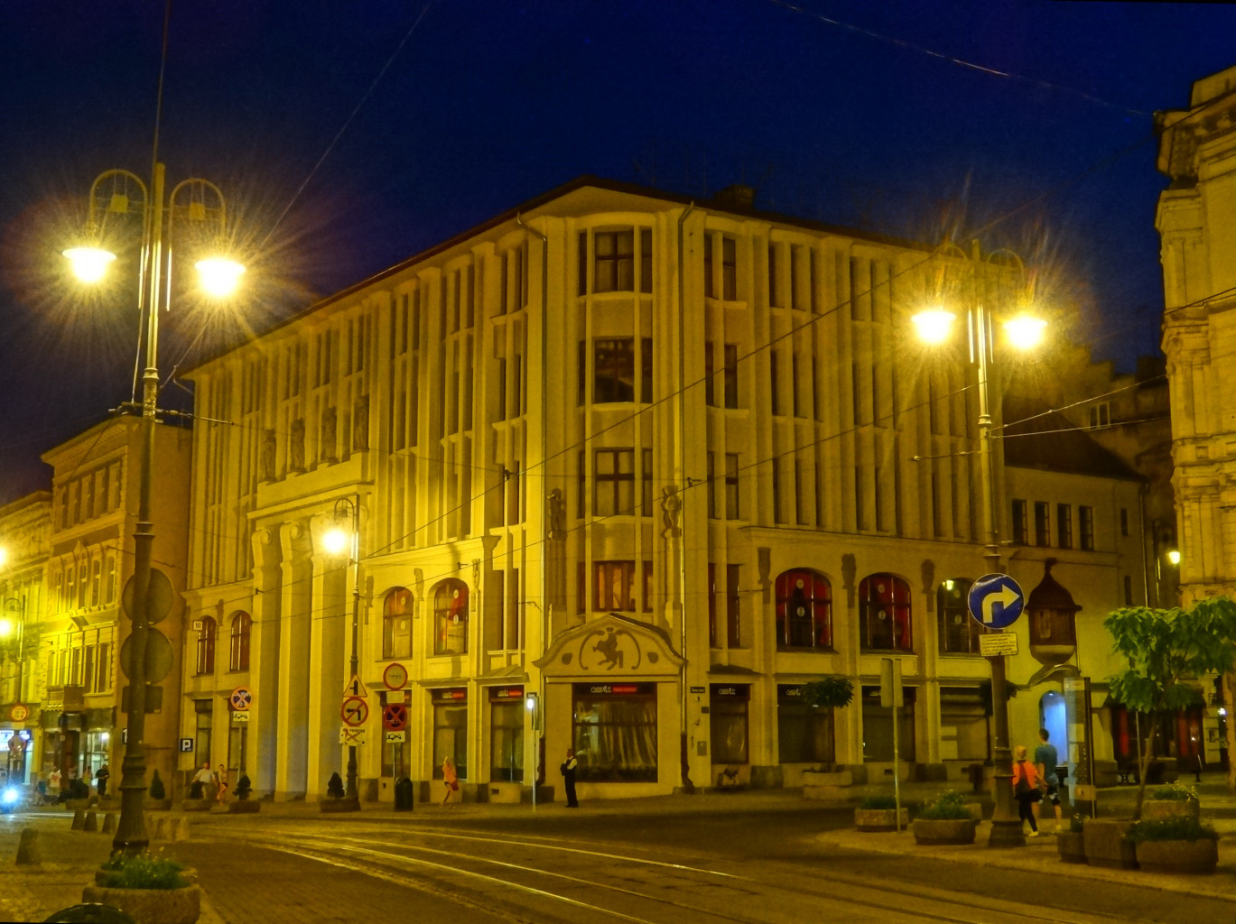 Dom Towarowy Jedynak, ul. Gdańska 15 w Bydgoszczy (zbud. 1910)